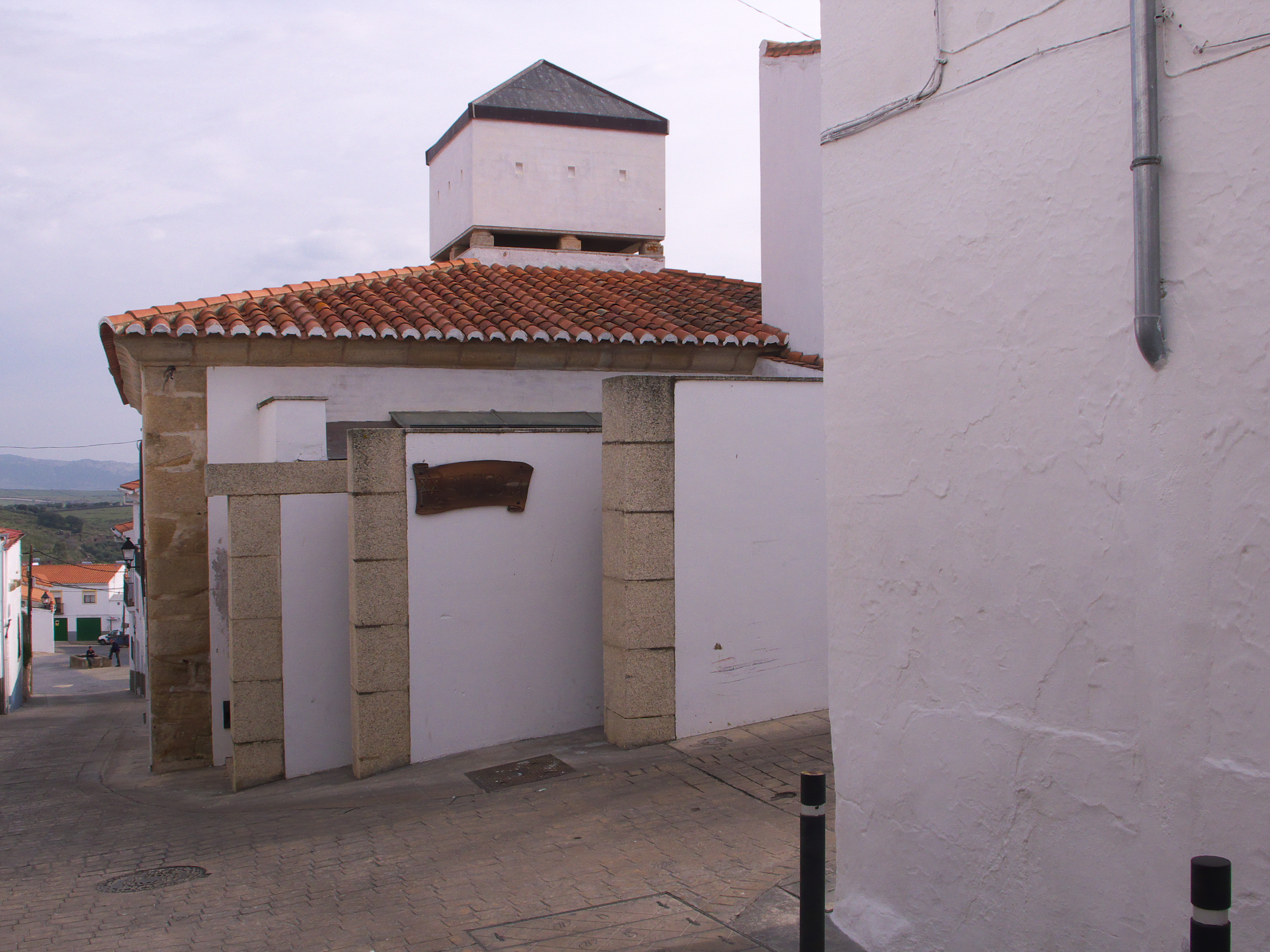 Afortunadamente se ha recuperado este importante monumento de la segunda mitad del siglo XIV.